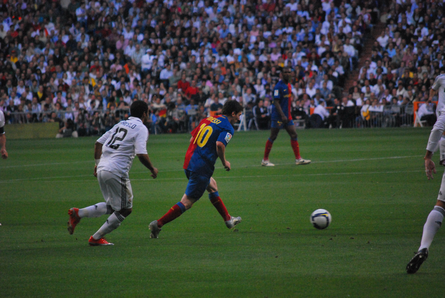 Real Madrid - Barça